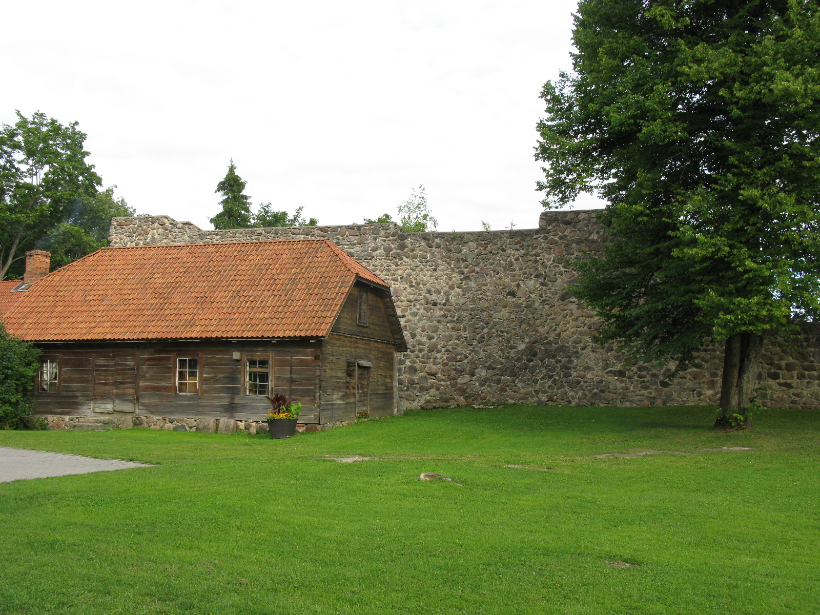 Vaade kagusse, mantelringmüüri siseküljele. Risti läbi mõisaaegse abihoone läks kunagi pea - ja I eeslinnust eraldav müür.